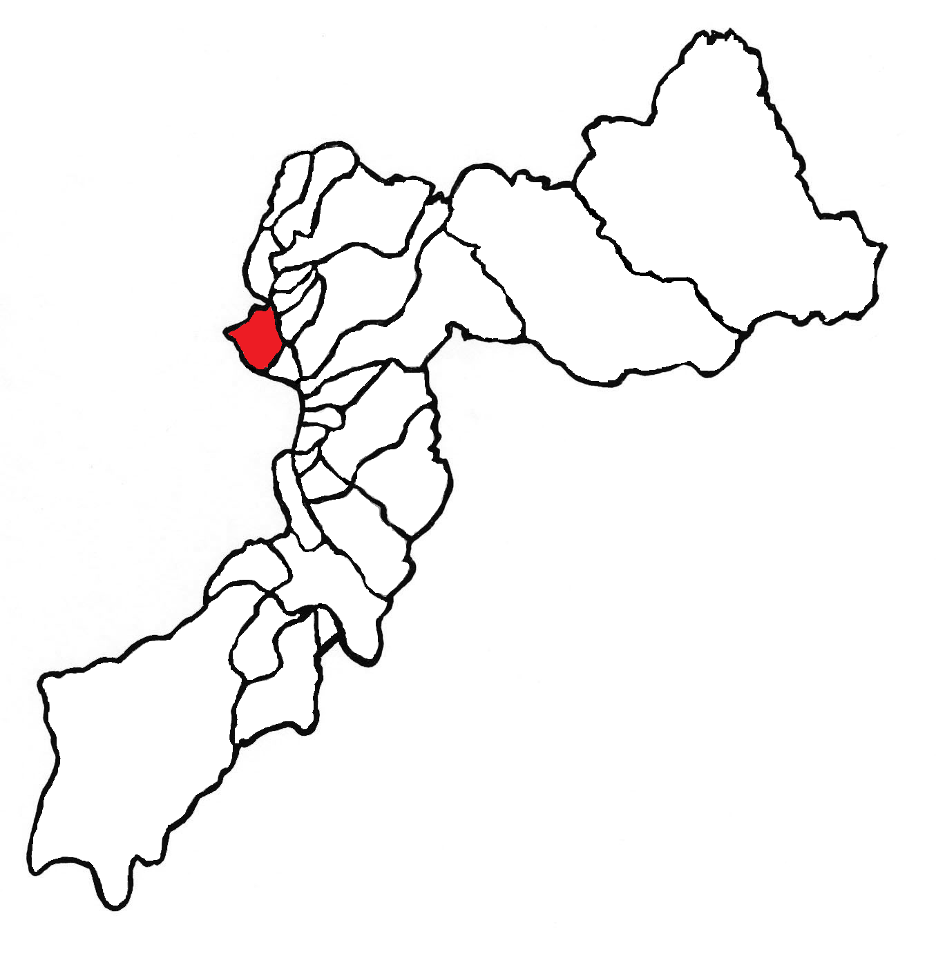 Ubicación del distrito en la provincia de Huancayo, departamento de Junín, Perú